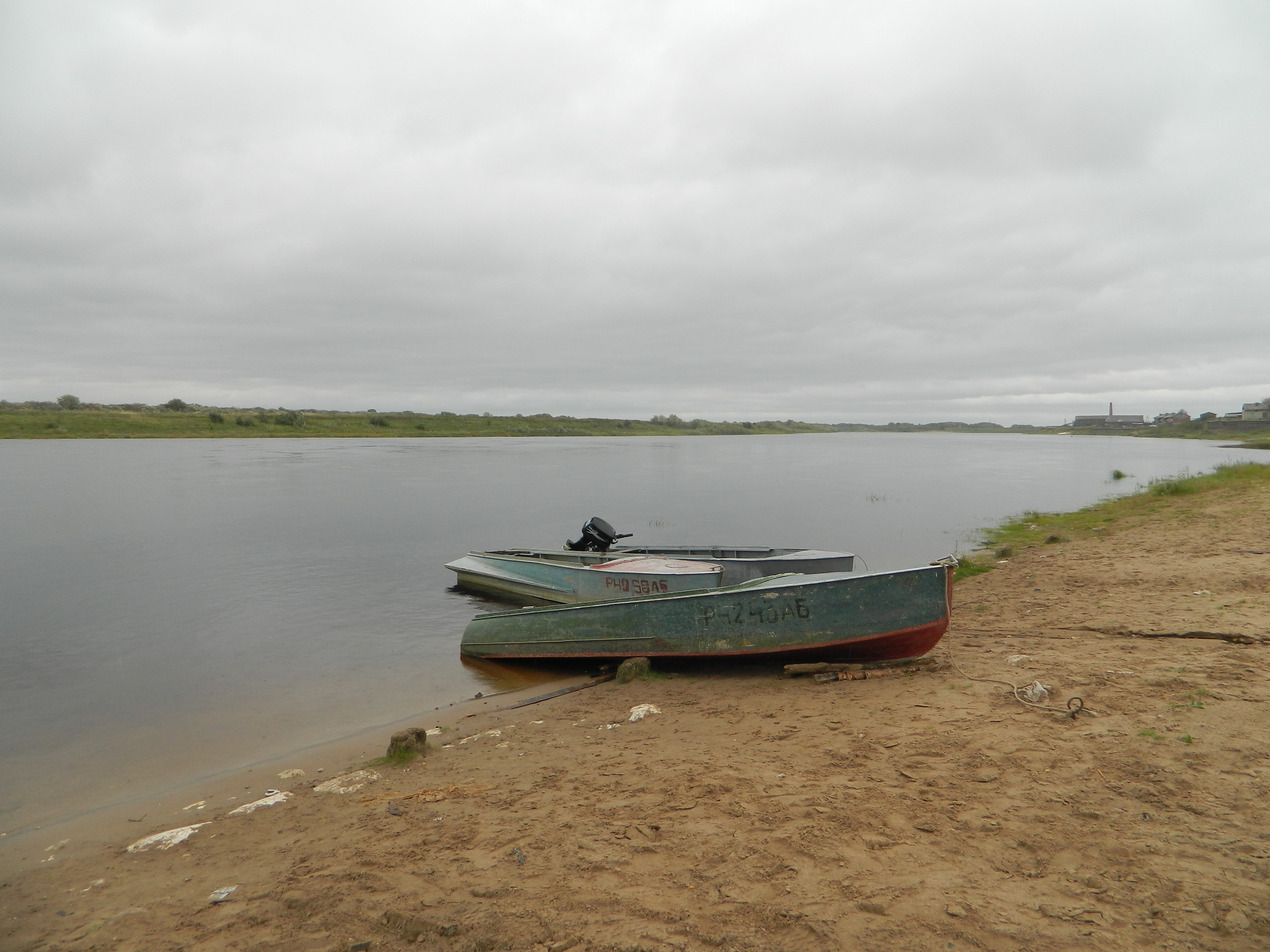 Река Пинега в поселке Пинега